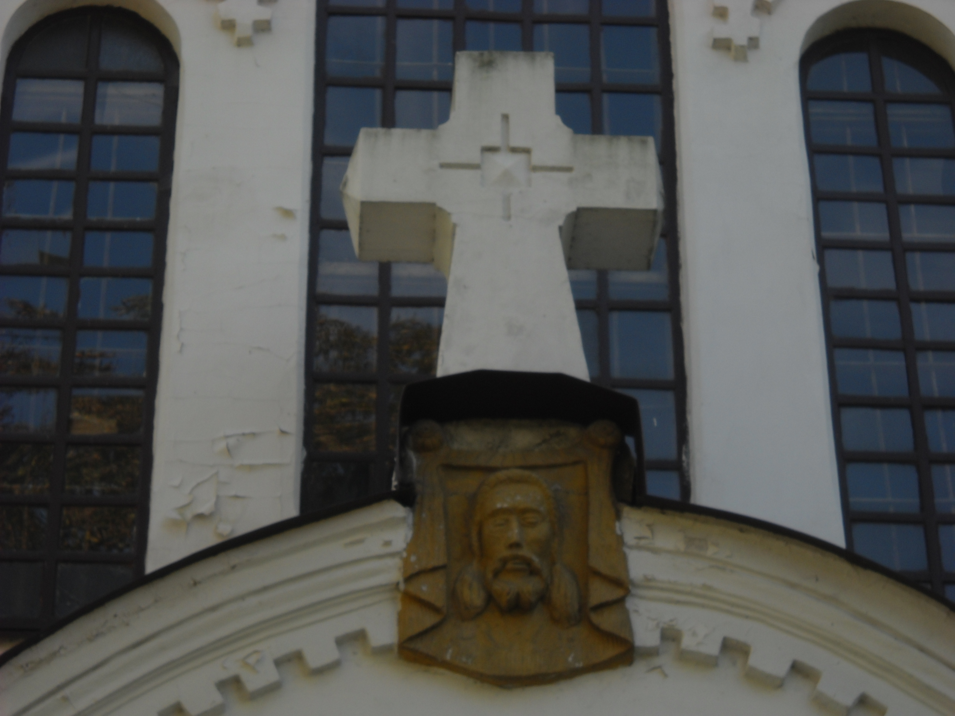 Detal cerkwi Narodzenia Matki Bożej we Włodawie